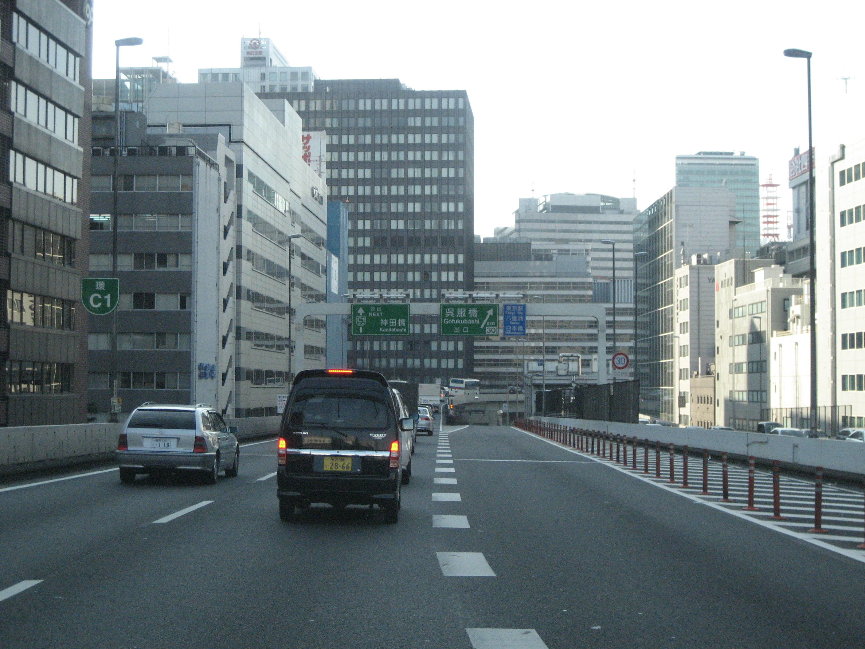 首都高速呉服橋出入口付近